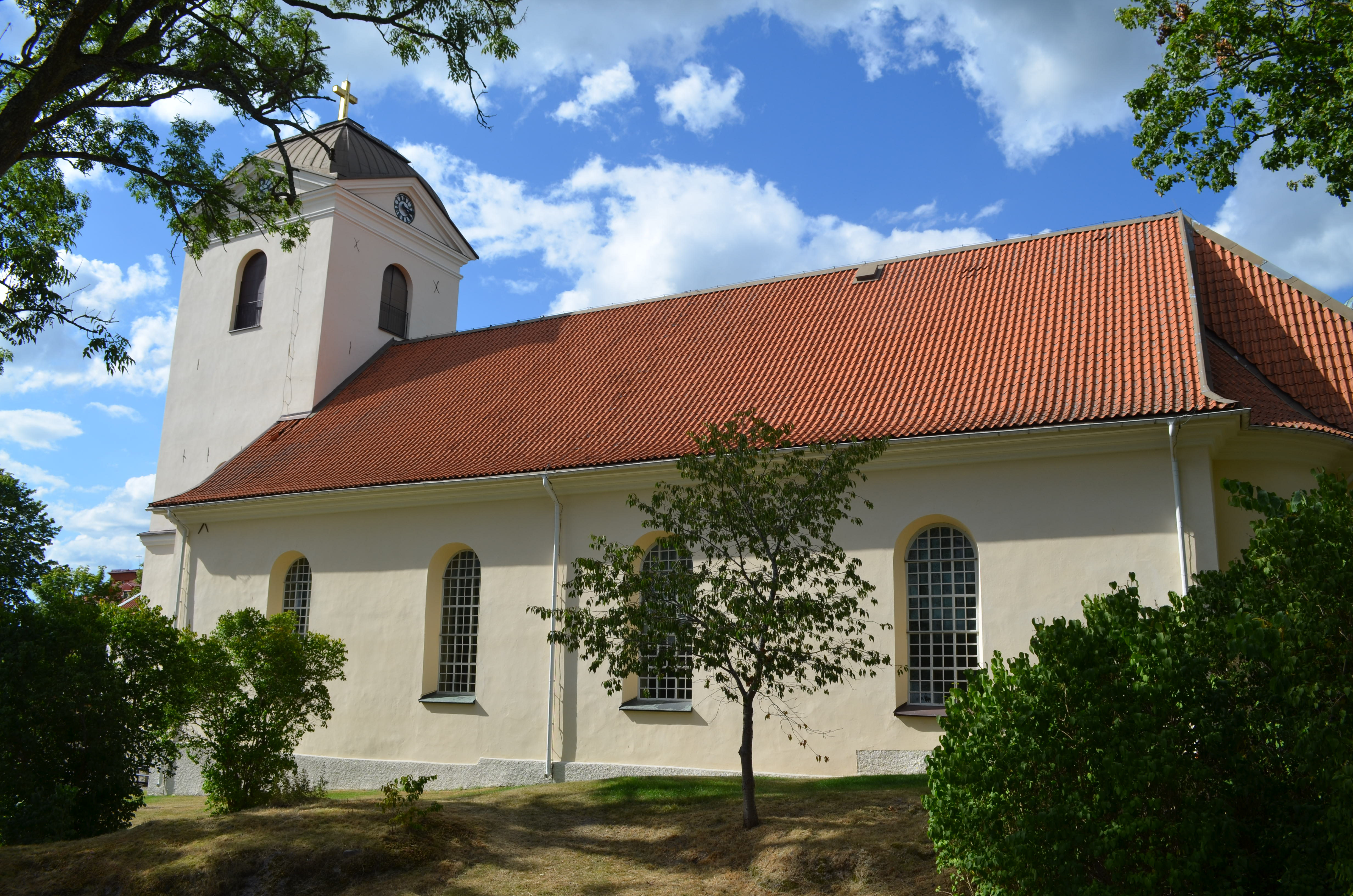 Sofia Magdalena kyrka 2017